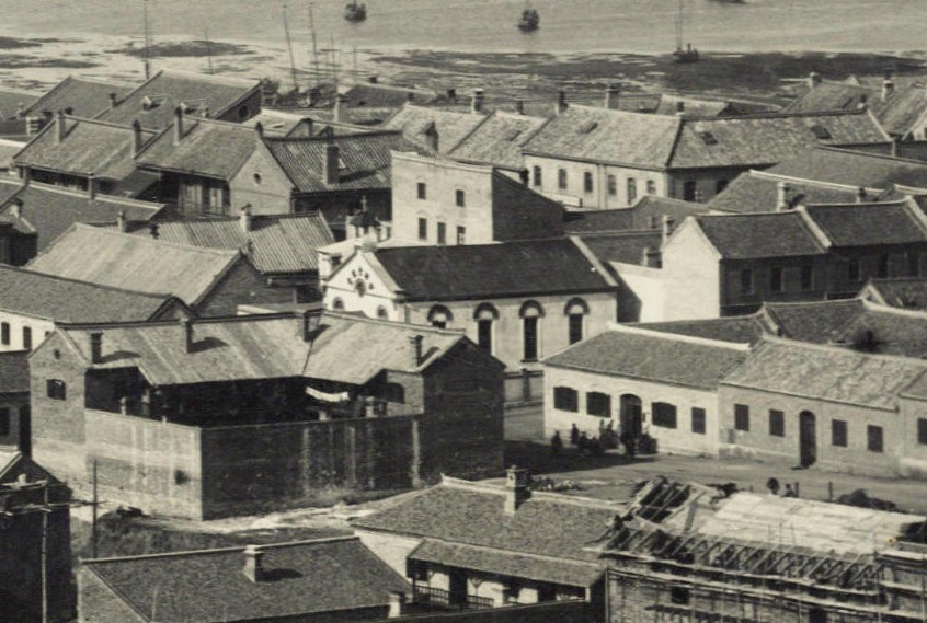 青岛大鲍岛信义会教堂